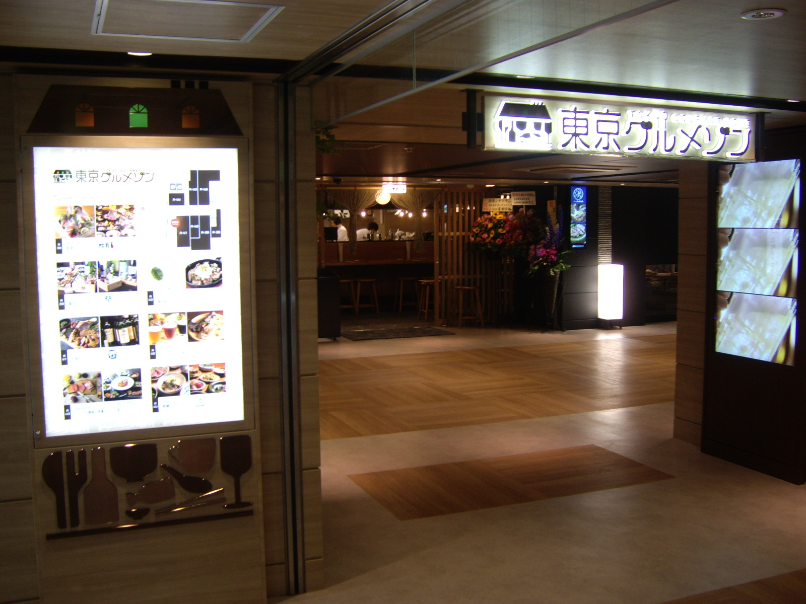 2018年6月28日にオープンした東京駅一番街二階の東京グルメゾン